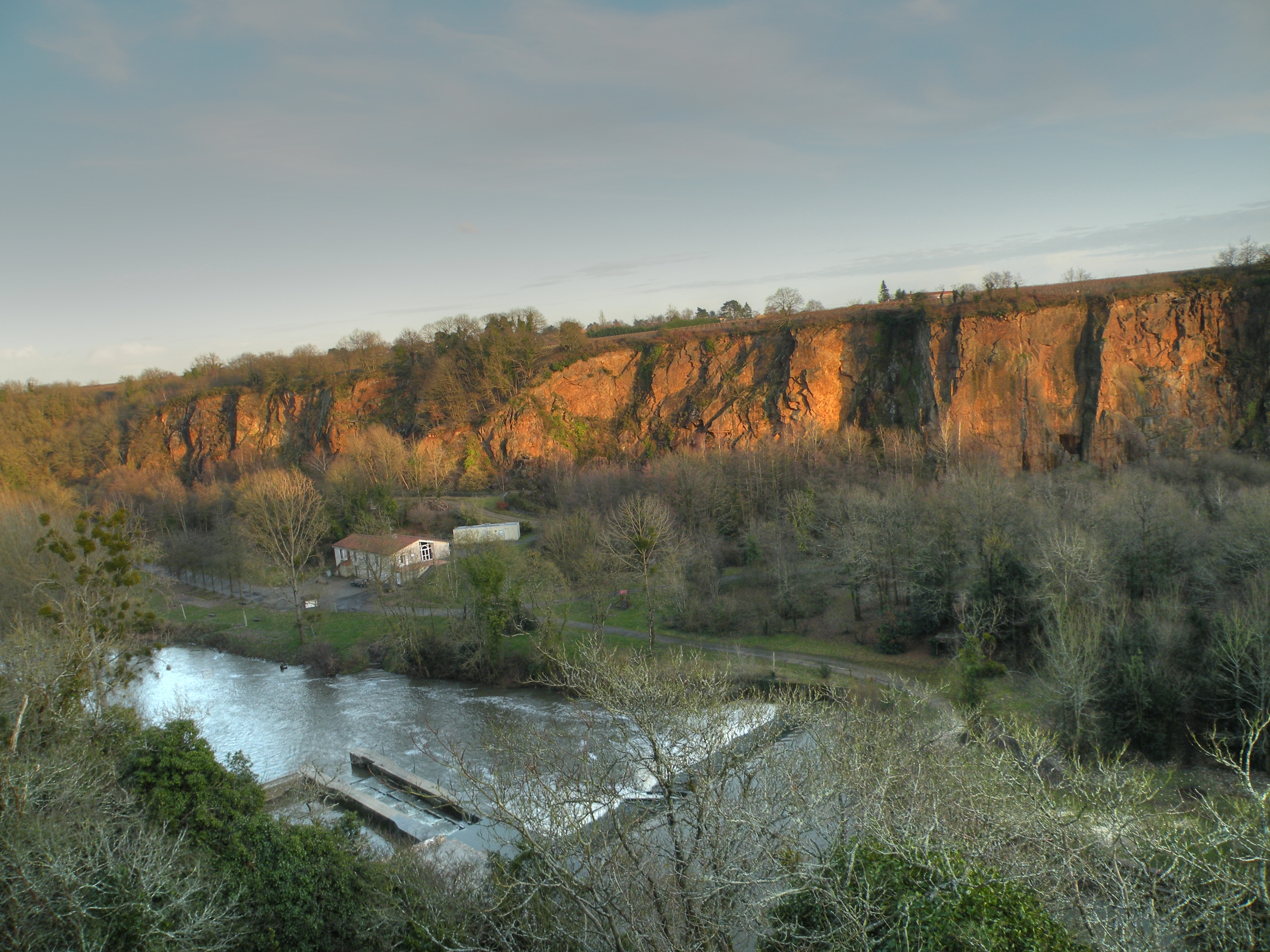 Pont Caffino, site de loisirs au bord de la Maine entre Château-Thébaud et Maisdon-sur-Sèvre.